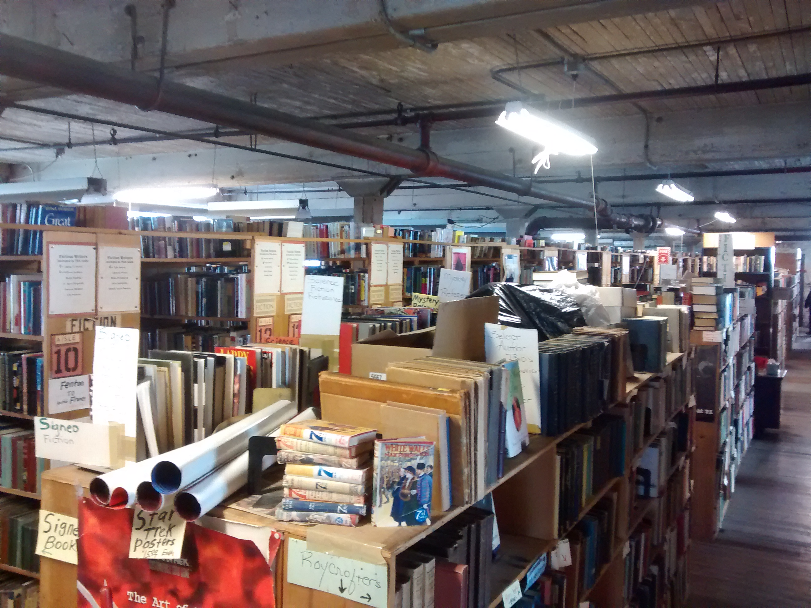 John K. King Books in Detroit, Michigan.